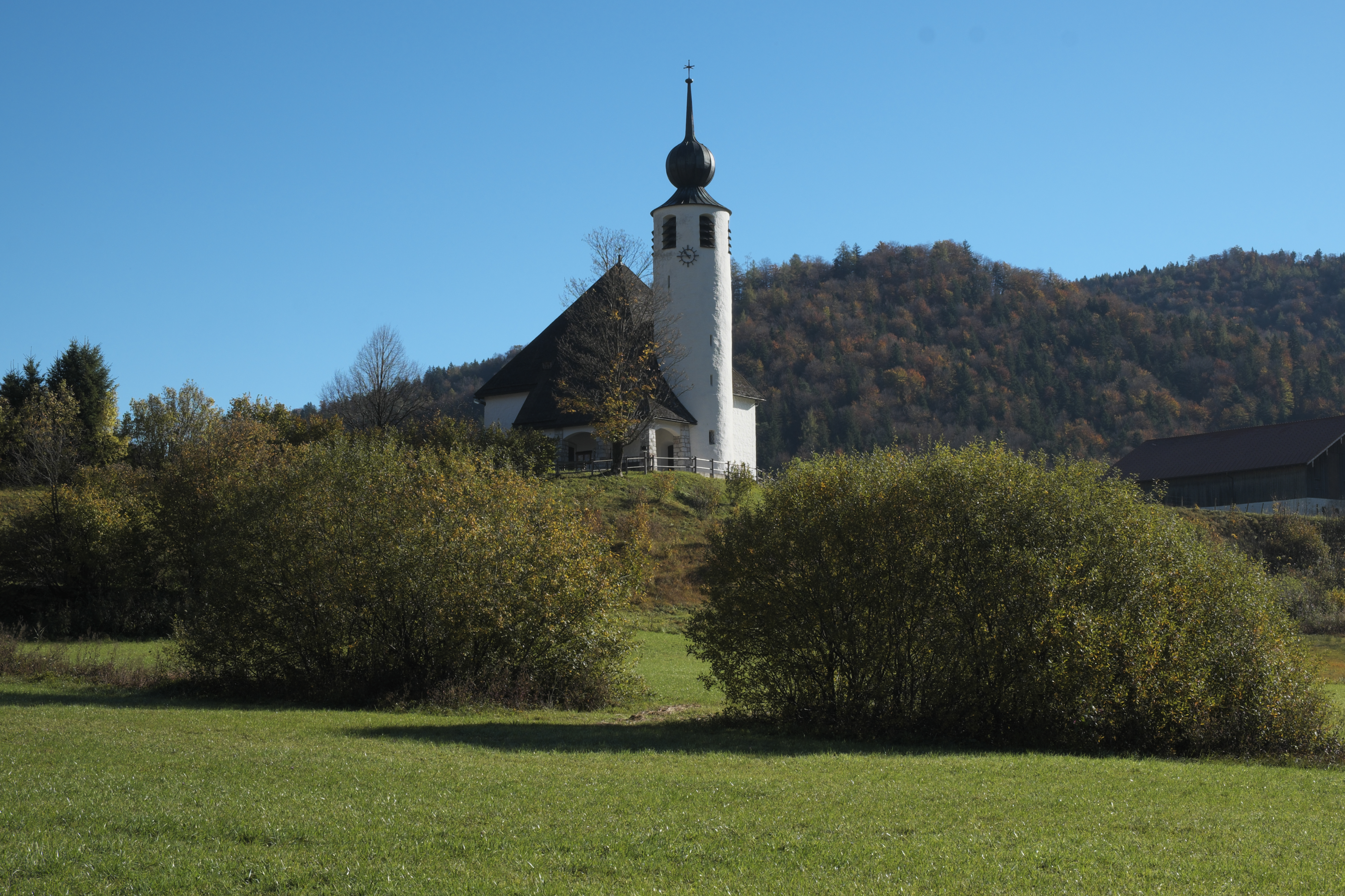 Katholische Filialkirche St. Vinzenz in Weißbach an der Alpenstraße (Schneizlreuth) im Landkreis Berchtesgadener Land (Bayern/Deutschland)